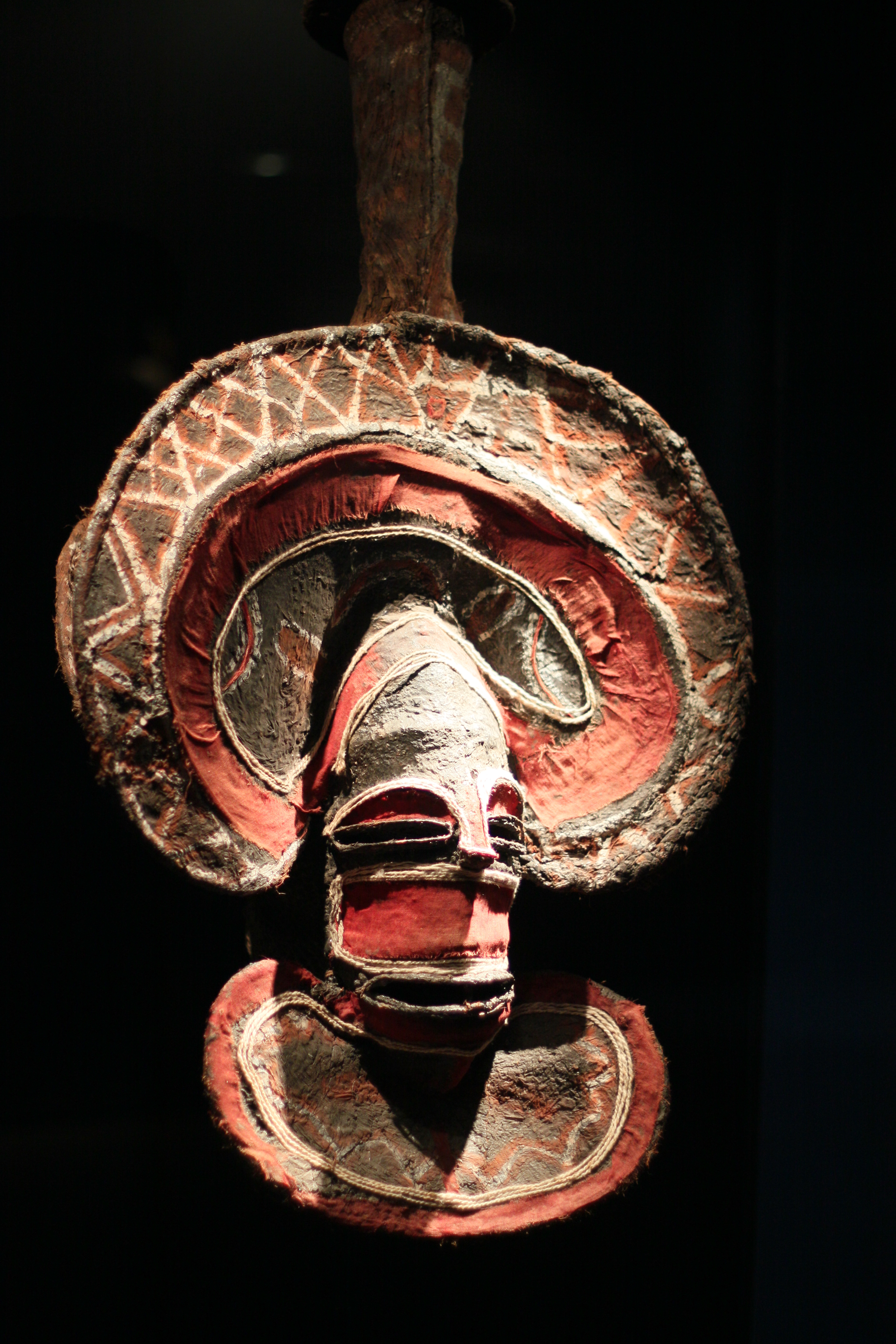 Kalelwa-Maske, Angola, Chokwe, um 1930; Basstoff, Stoff, Holz, Pflanzenfasern, Farbpigmente; Afrikaabteilung im Ethnologischen Museum, Berlin, Inv. Nr. III Nls 113 (Sammlung Hermann Baumann, erworben 1938(?)